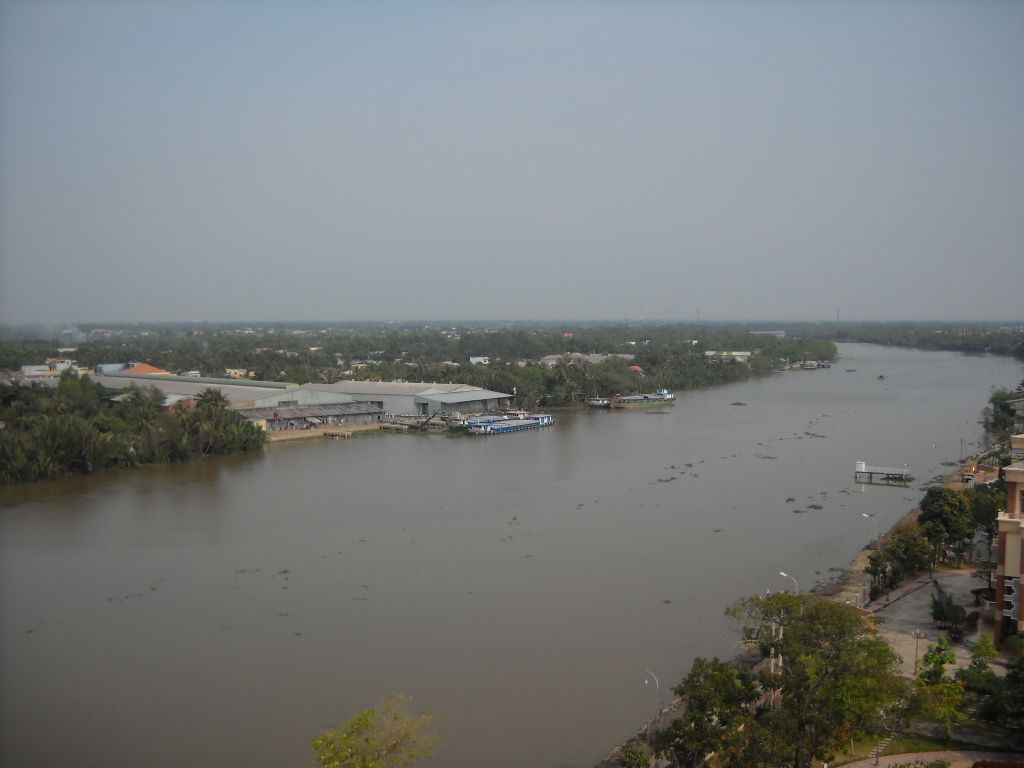 Vam Co Tay River in Tan An, Long An, Vietnam.